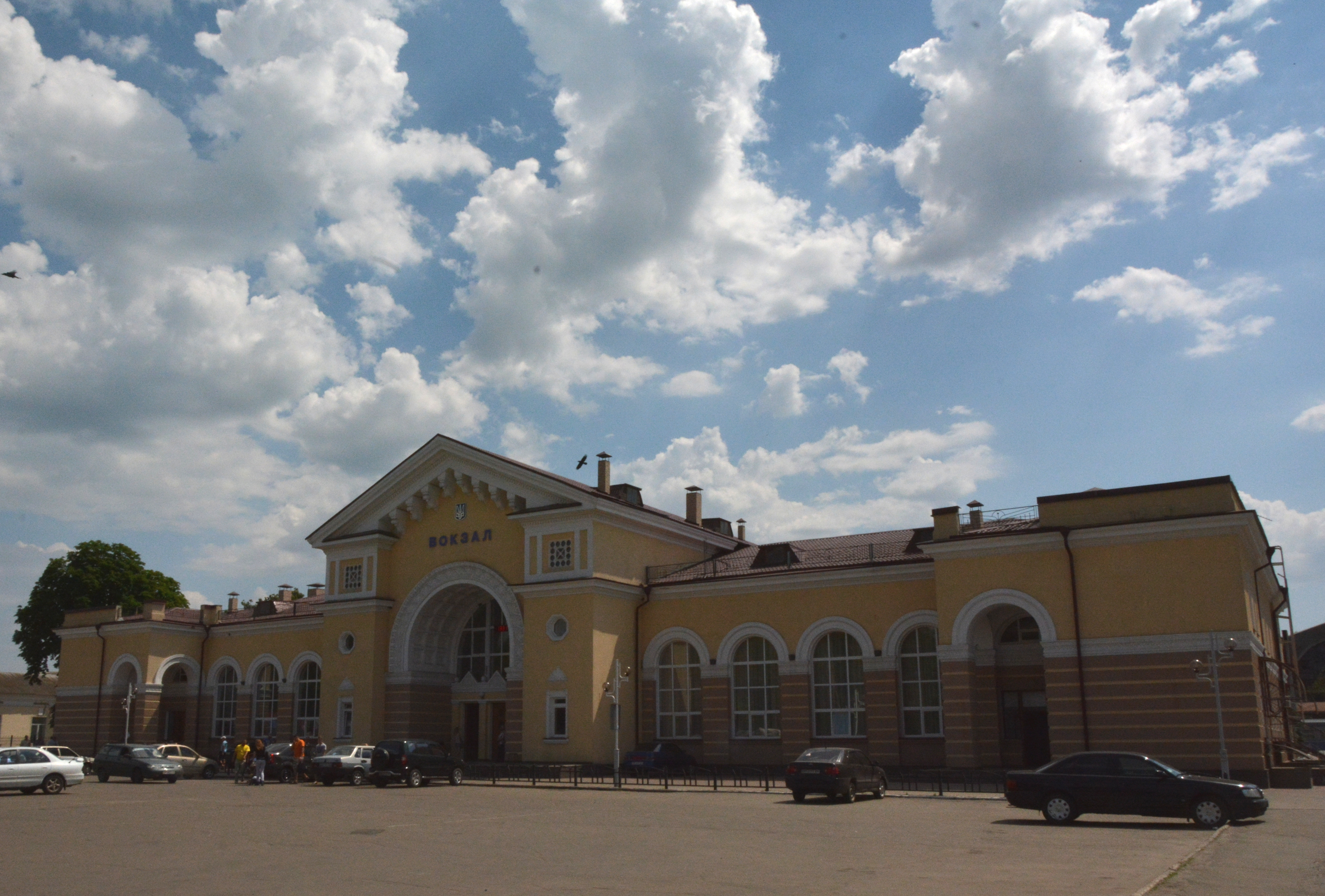 Залізничний вокзал (мур.), Конотоп, вул. Свободи, 23